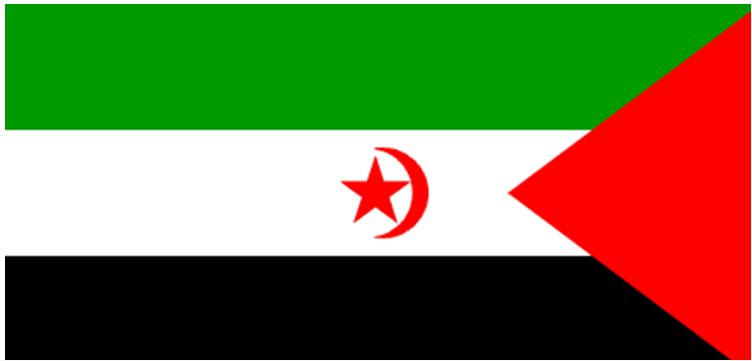 Прапор САДР в разі перемоги в конфлікті з Королівством Марокко